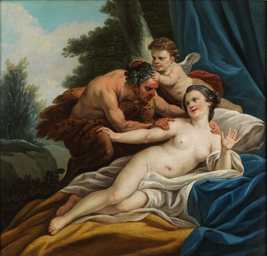 Eine Nymphe wird von einem Satyr (Pan) begehrt, Öl auf Leinwand, 63 x 65 cm